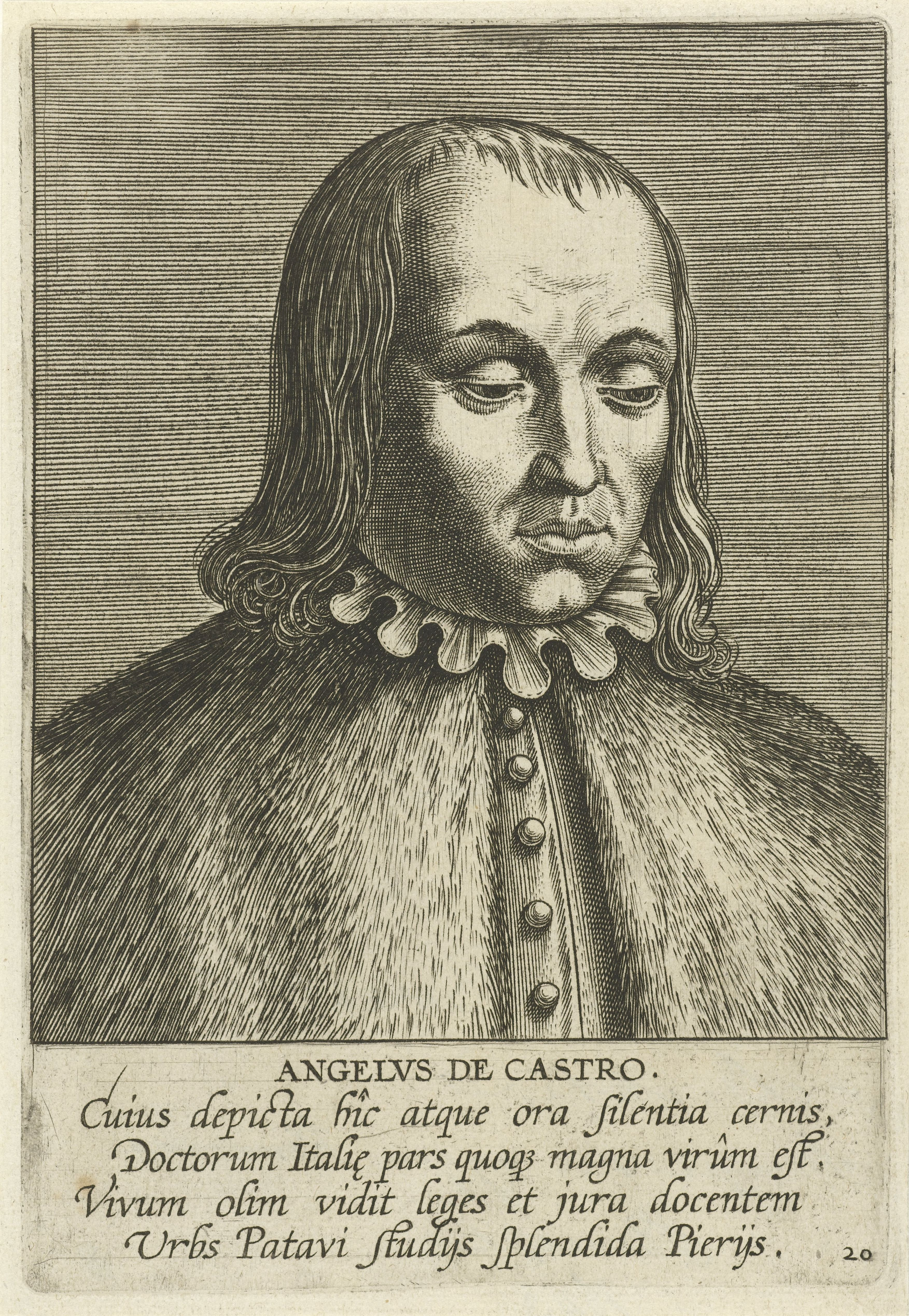 IdentificatieTitel(s): Portret van Angelo da CastroAngelvs de Castro (titel op object)Portretten van beroemde geleerden (serietitel)Imagines L. Doctorum Virorum (serietitel)Objecttype: prent Serienummer: 20/50Objectnummer: RP-P-1909-4449Catalogusreferentie: New Hollstein Dutch 604Opschriften / Merken: verzamelaarsmerk, verso midden, gestempeld: Lugt 2228Omschrijving: Portret van Angelo da Castro, een Italiaanse jurist. Buste naar rechts. De prent heeft een Latijns onderschrift en maakt deel uit van een serie van beroemde geleerden.VervaardigingVervaardiger: prentmaker: Philips Galleschrijver: Franciscus Raphelengius (I) (vermeld op object)uitgever: Philips Galle (mogelijk)uitgever: Theodoor Galle (mogelijk)Plaats vervaardiging: AntwerpenDatering: 1587 - 1606Fysieke kenmerken: gravureMateriaal: papier Techniek: graveren (drukprocedé)Afmetingen: plaatrand: h 168 mm × b 115 mmOnderwerpWie: Angelo de CastroVerwerving en rechtenVerwerving: aankoop 1905Copyright: Publiek domein